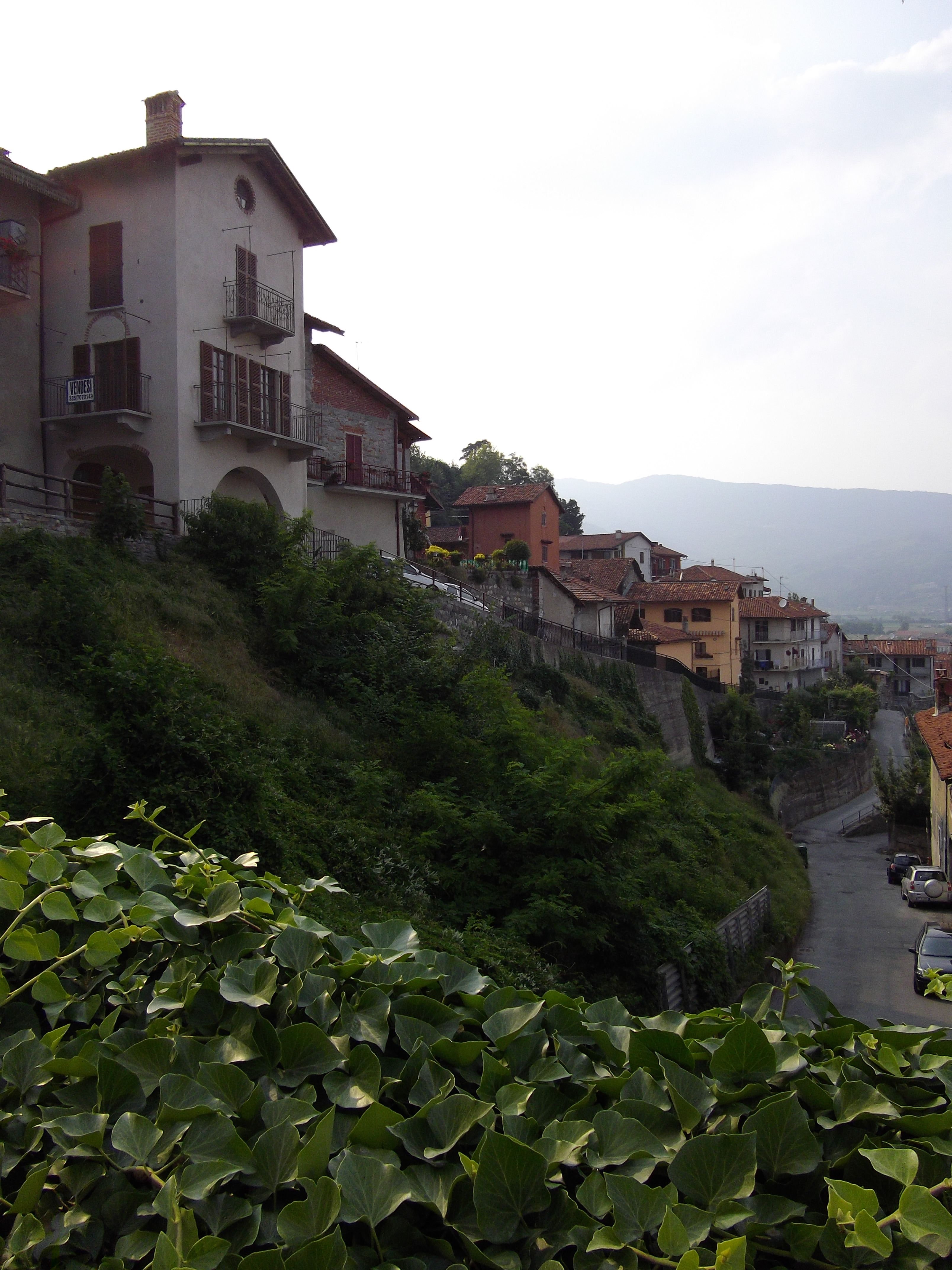 Piemontèis: 'L Borch 'd Costiole